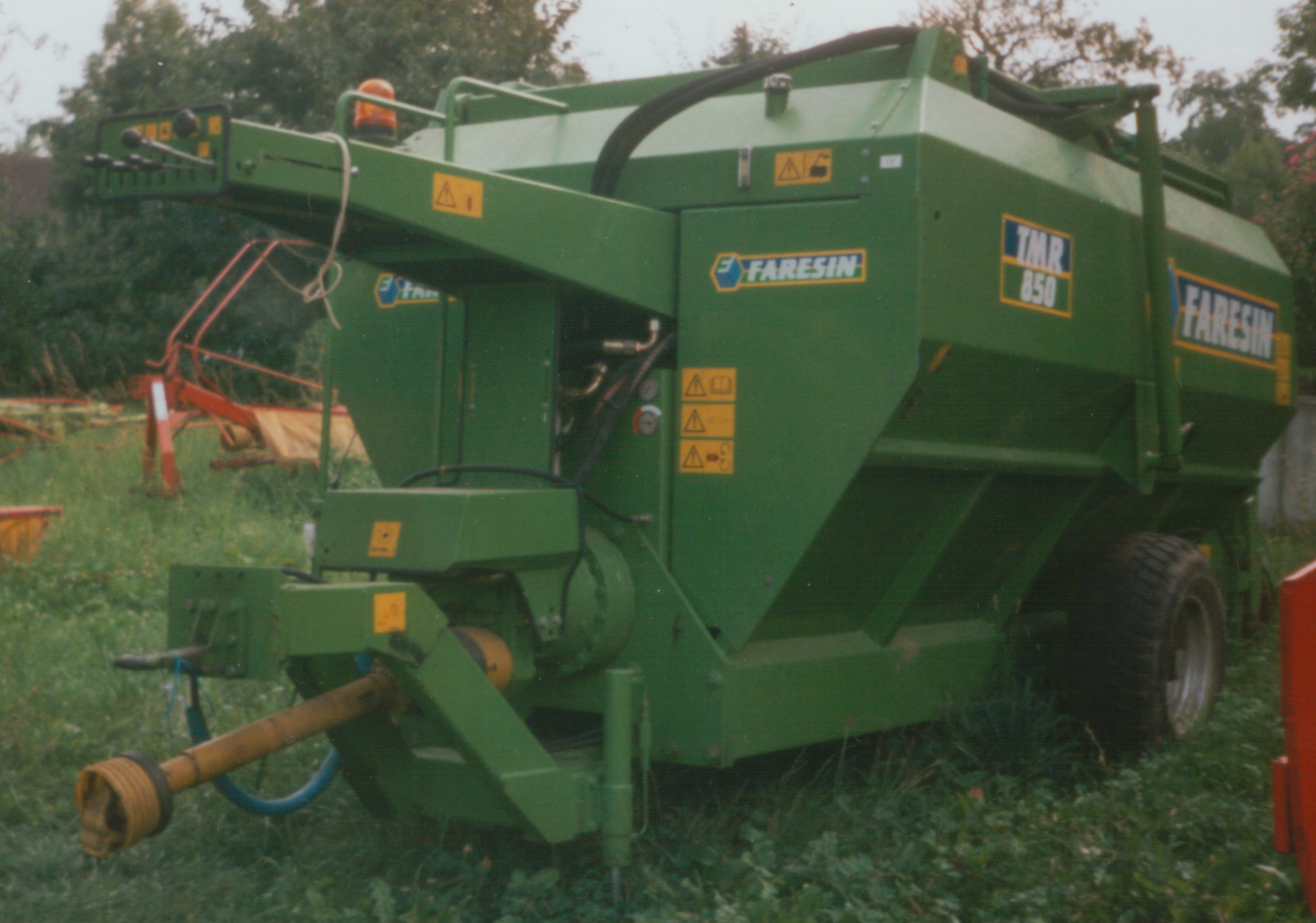 Ein Faresin-Futtermischwagen